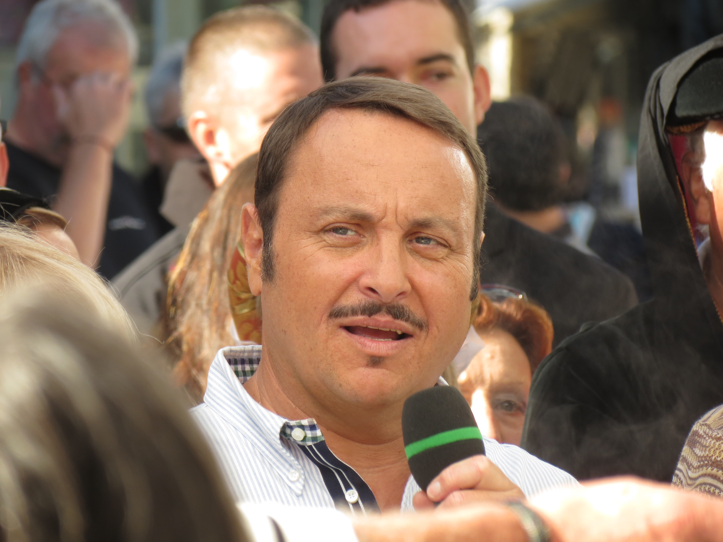 Guérande - Midi en France - Vincent Ferniot